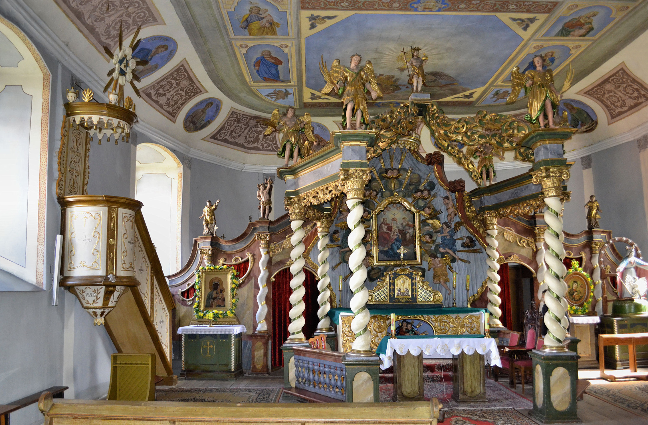 Kościół Świętej Trójcy w Czaplinku